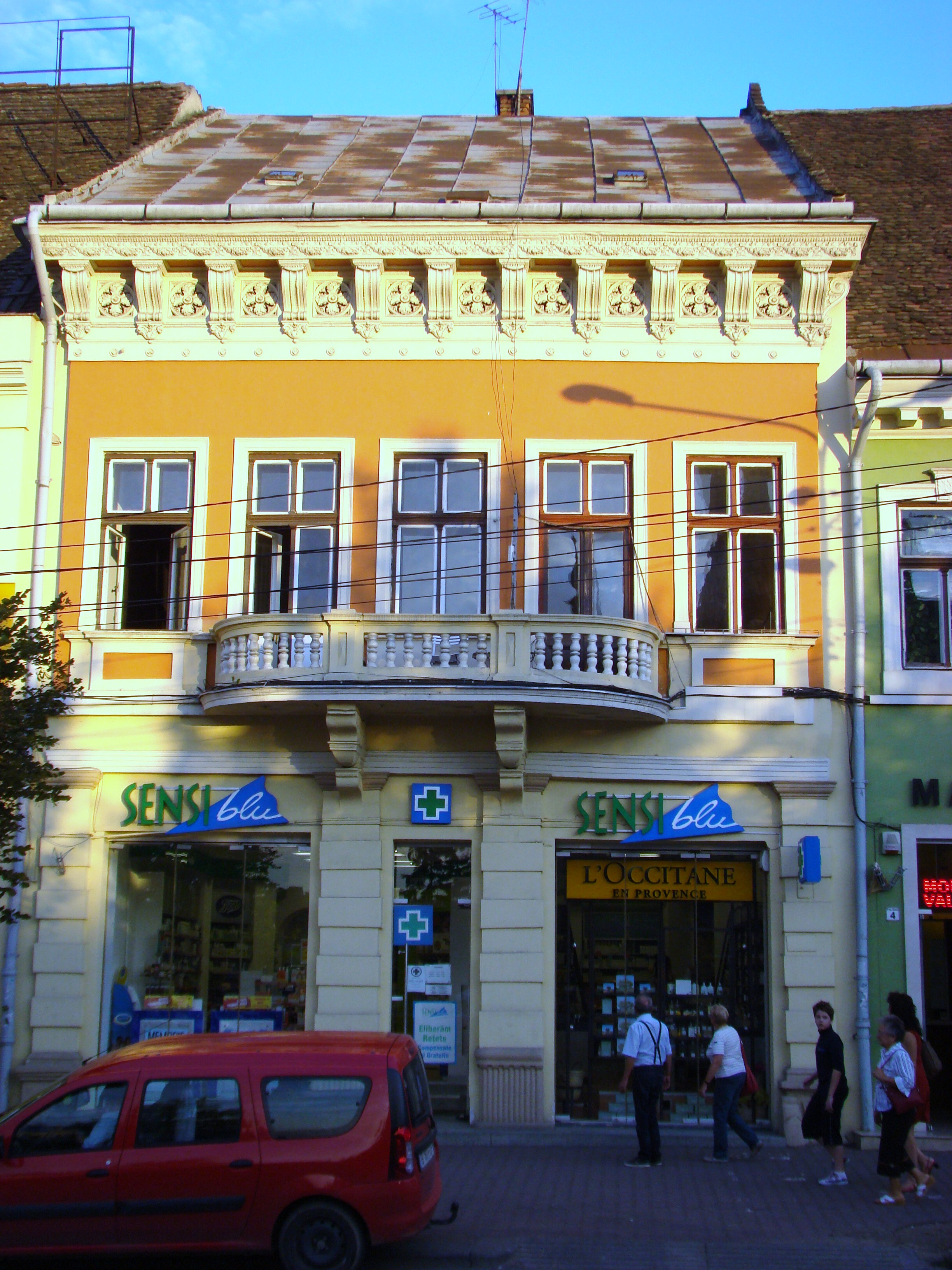 Clădire monument istoric, Piața Unirii Nr.4